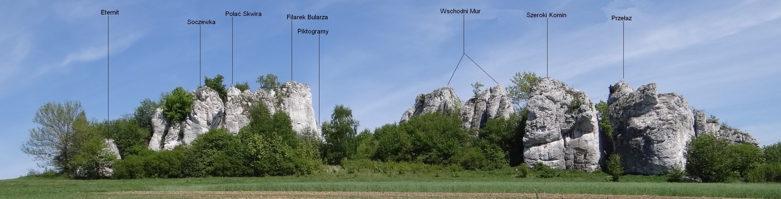 Słoneczne Skały w Dolinie Szklarki